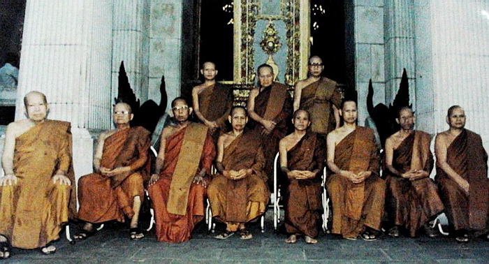 ครูบาอาจารย์บันทึกภาพร่วมกันหน้าพระอุโบสถ วัดบวรนิเวศวิหาร บางลำภู เขตพระนคร กรุงเทพมหานคร ในพิธีพุทธาภิเษกพระกริ่งพระศาสดา ญสส. (รุ่นแรก) เมื่อวันที่ 24 มกราคม พุทธศักราช 2535